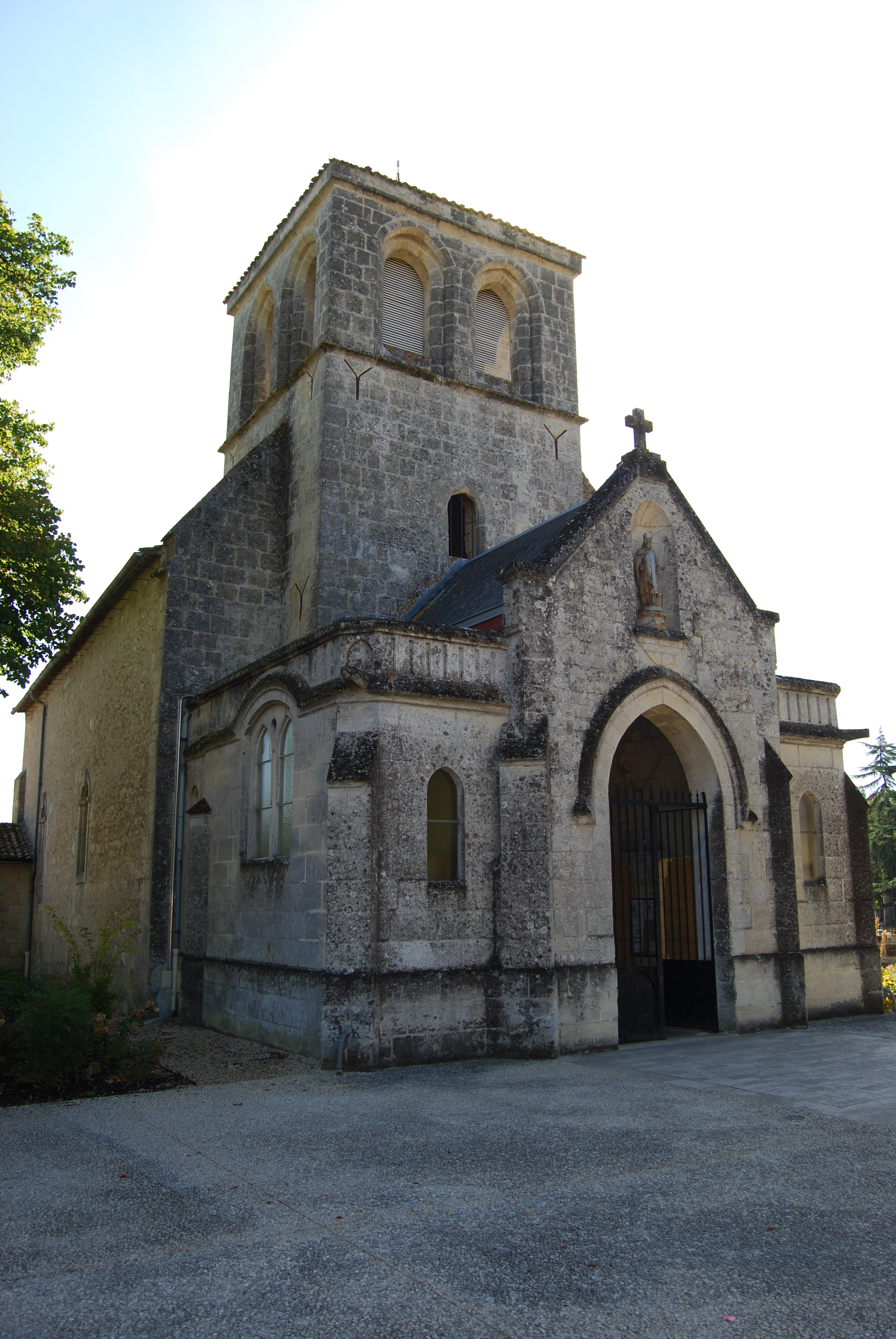 Église Saint-Seurin d'Artigues-près-Bordeaux, (Inscrit, 1925) .